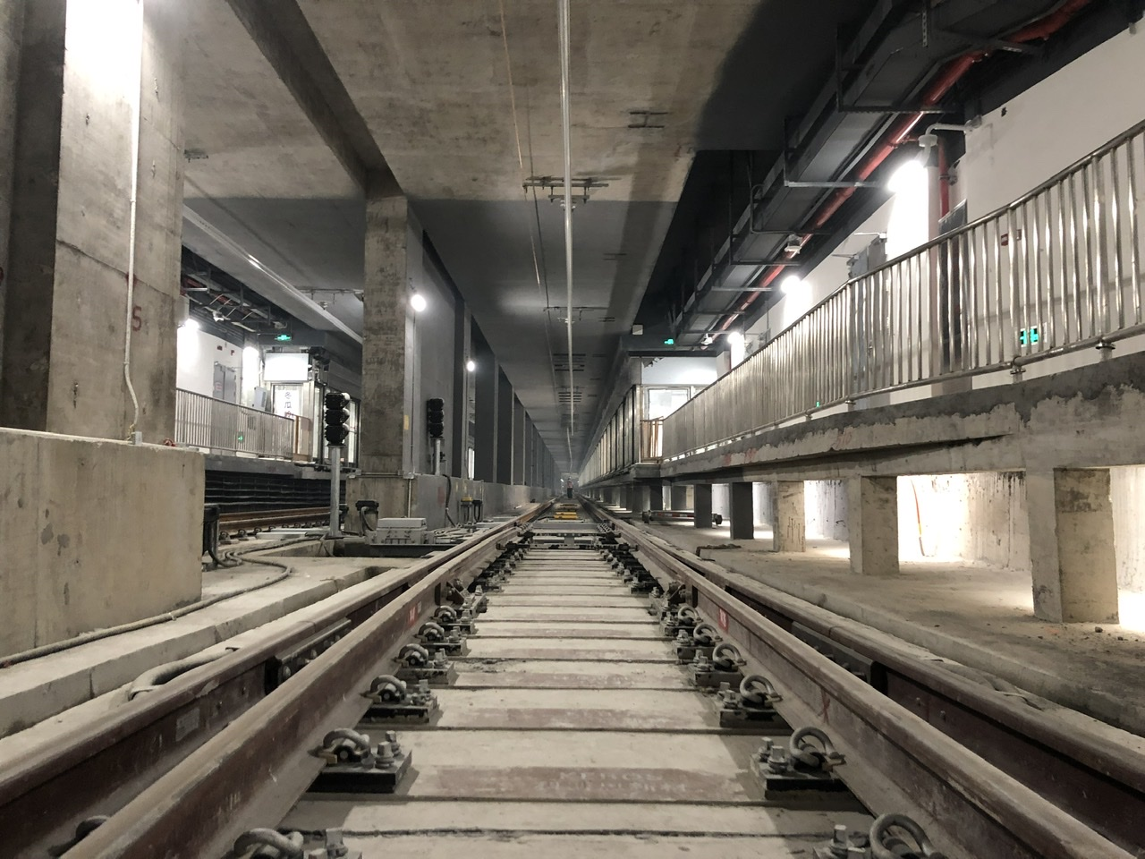 冬瓜岭站轨道